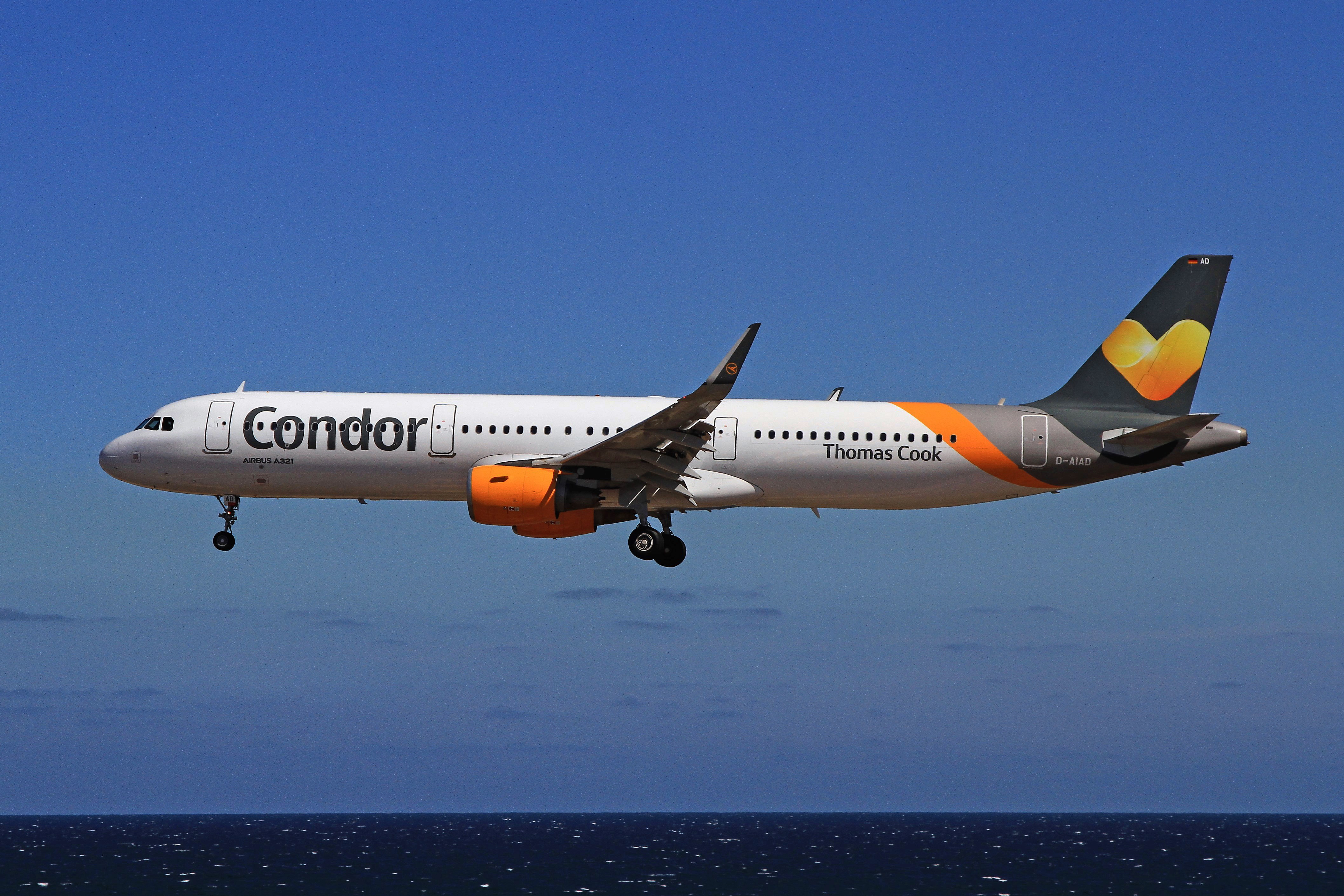 D-AIAD A321 Condor Lanzarote 28-03-2017